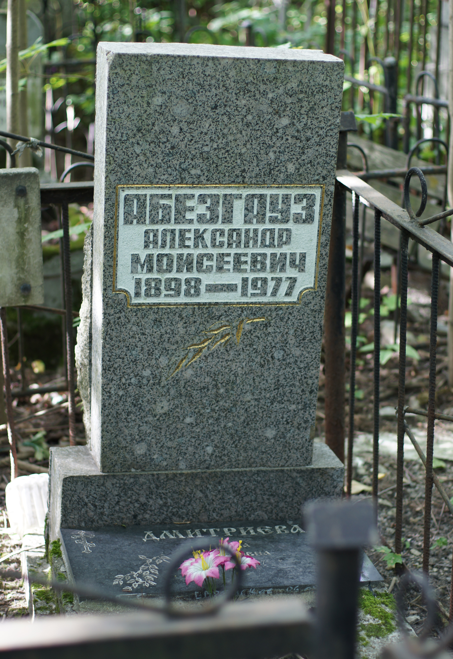 Могила профессора Александра Моисеевича Абезгауза на Преображенском кладбище Санкт-Петербурга